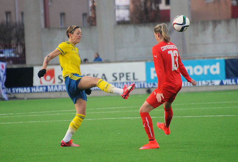 a_30_0774